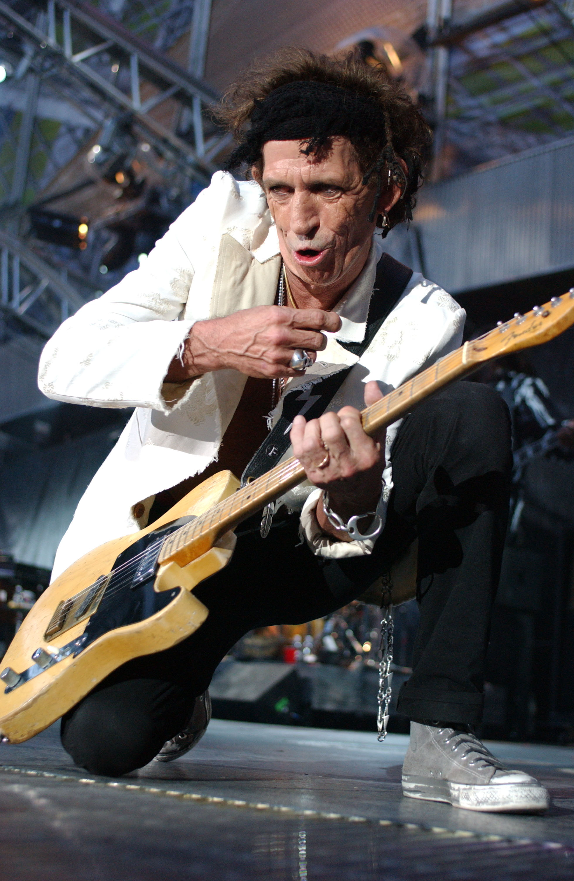 Utente:Kronos, K.Richards Live in concert 2003 (10 giugno 2003, Stadio Giuseppe Meazza) - Milano